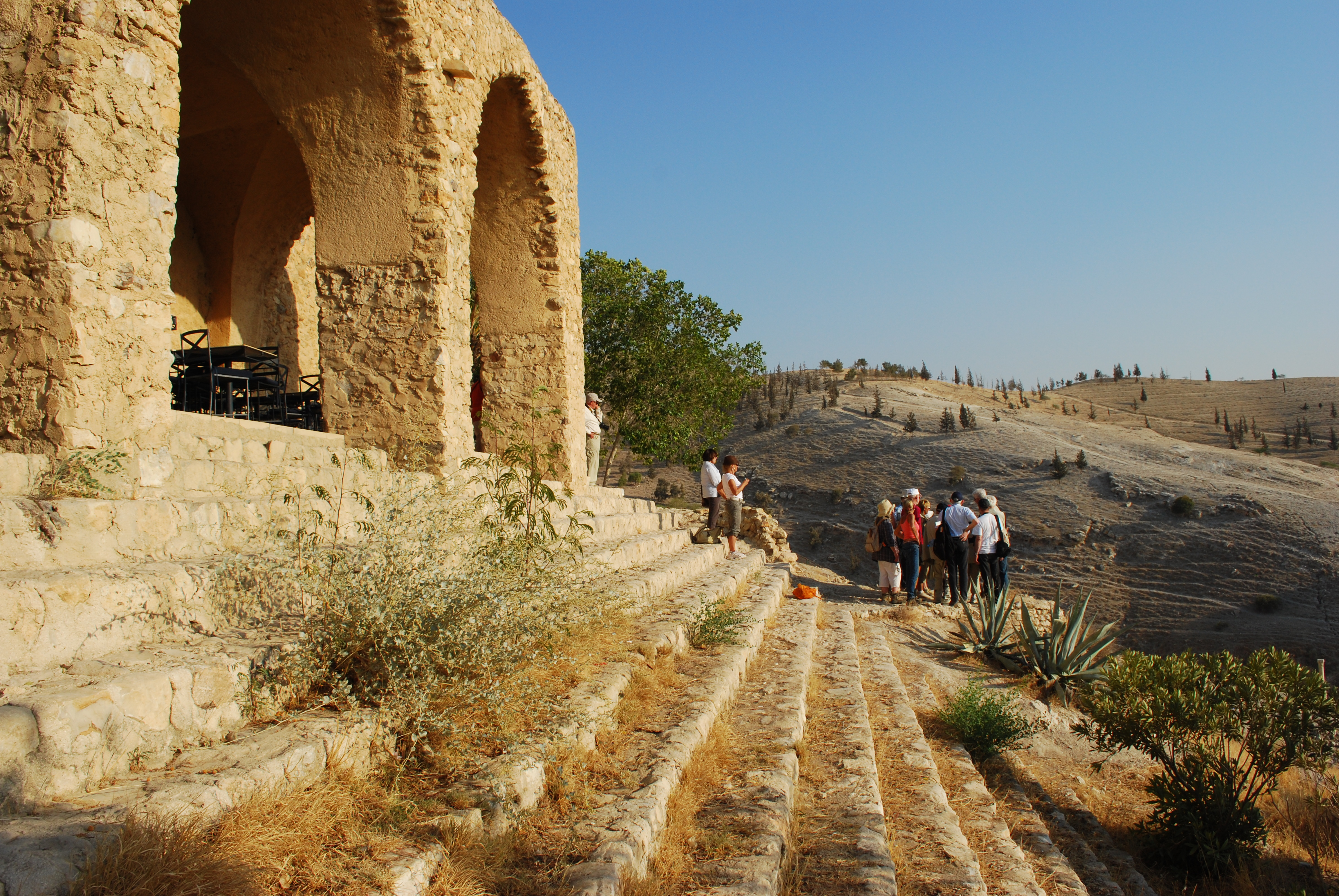 Pella (Tabaqat Fahil). Restaurant panoramique surplombant le site archéologique.